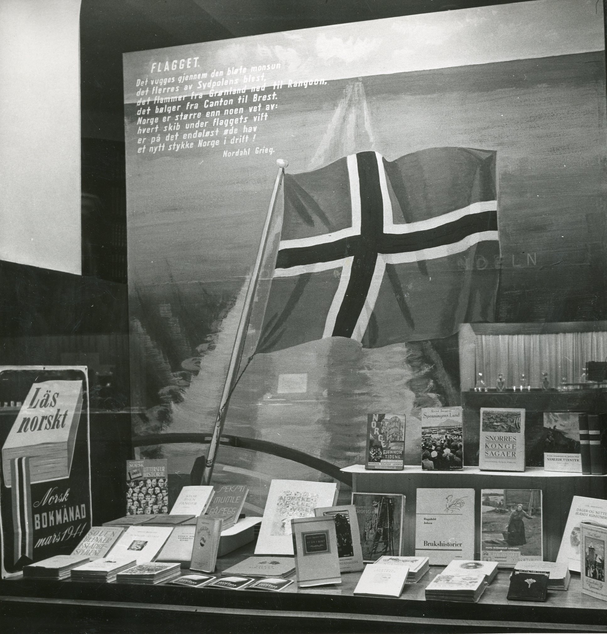 Kulturmønstringer